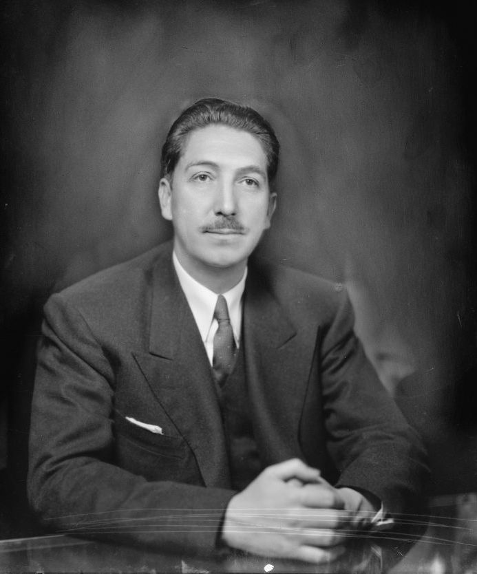 Miguel Alemán Valdés. Presidente de México